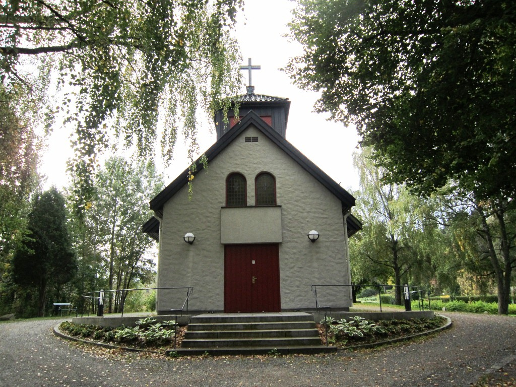 Kapellet på Kolbotn gravlund (Oppegård kommune)